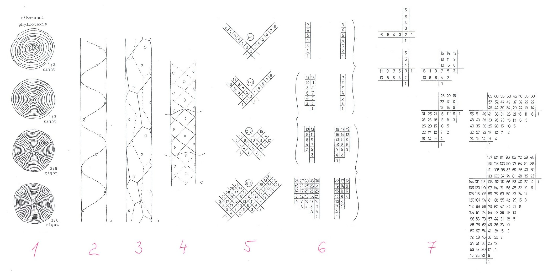 Modellezési lépések a Fibonacci növények rácsszerkezetének bemutatásához